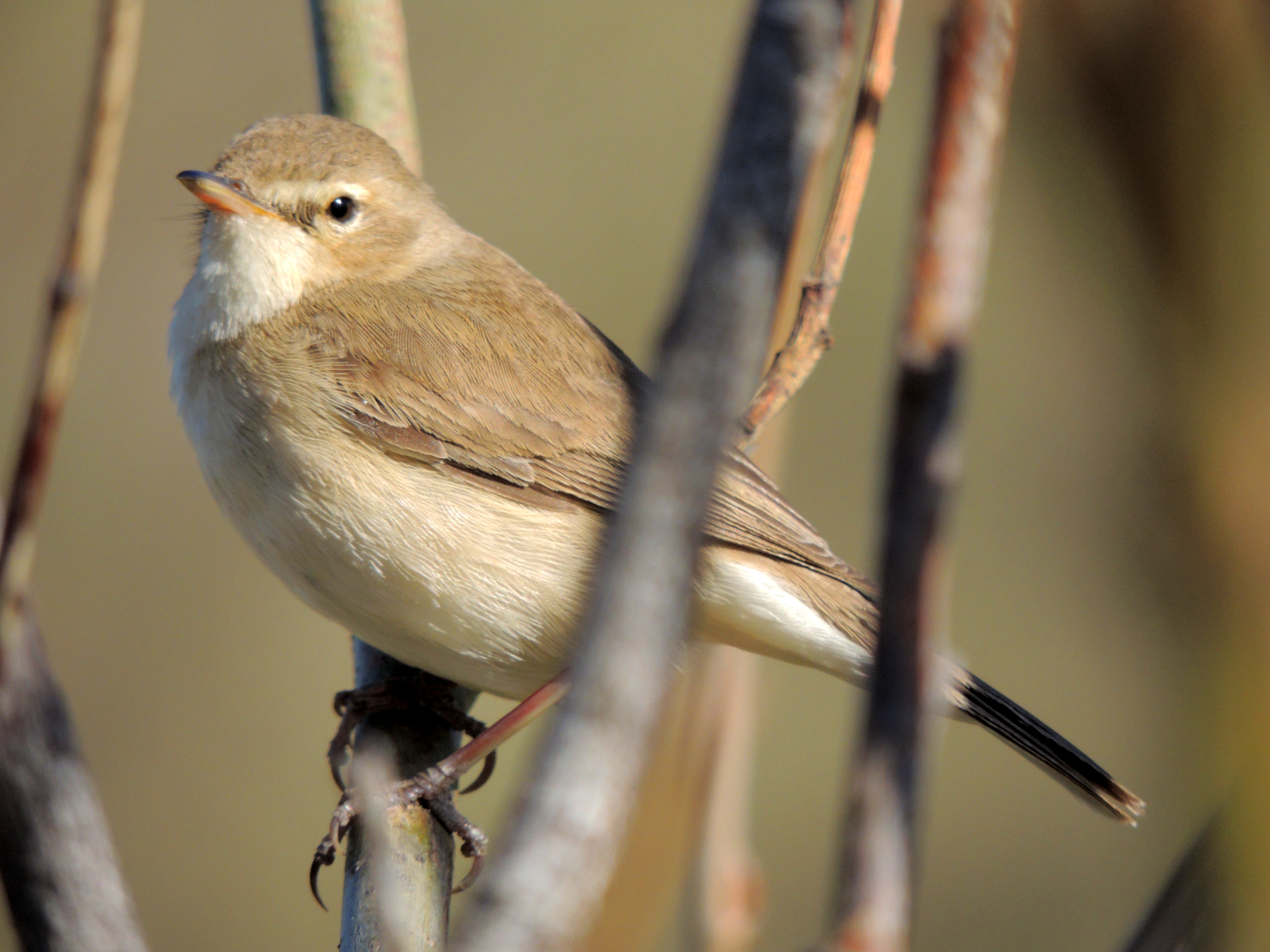 Бормотушка